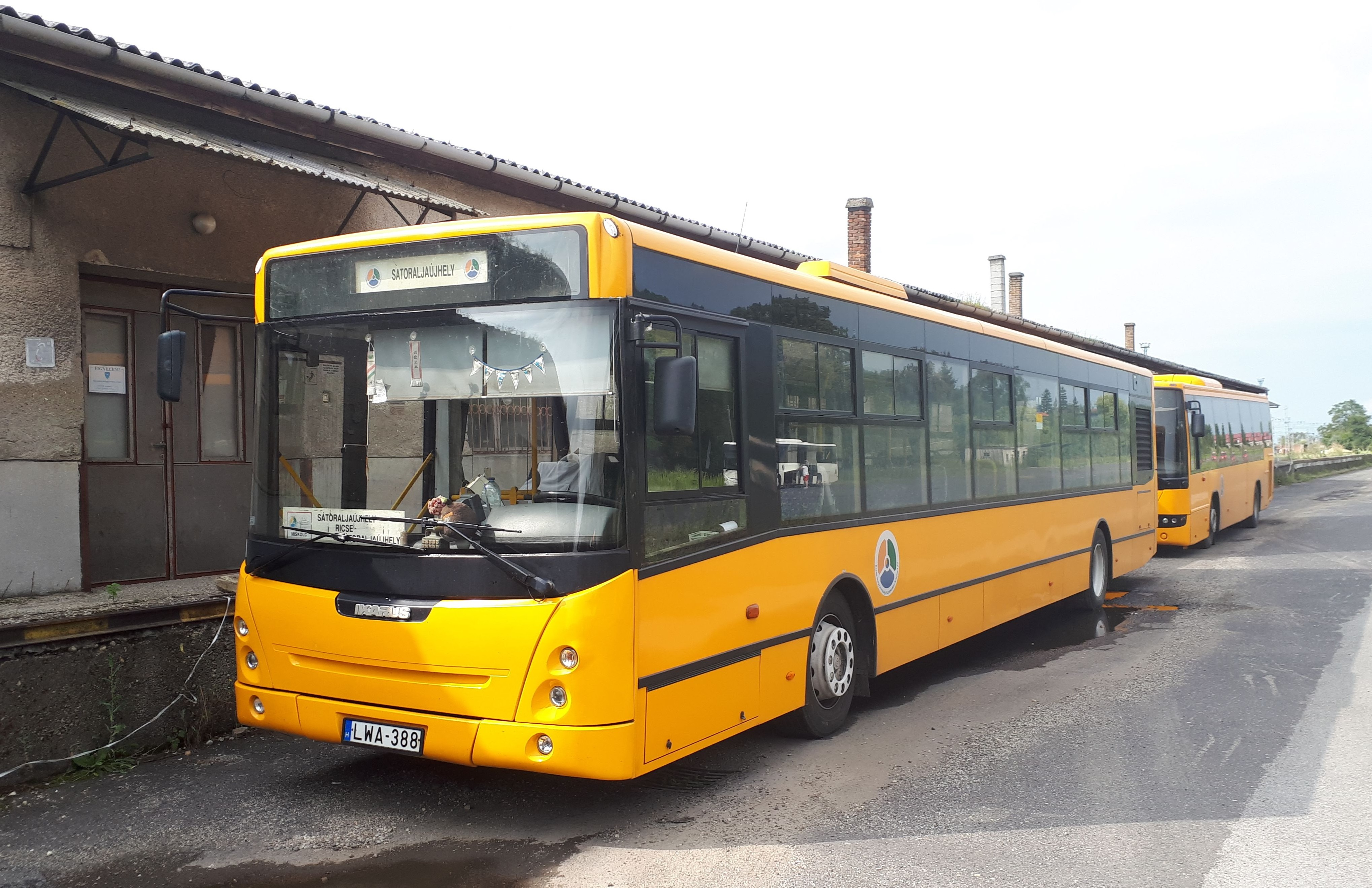 Az ÉMKK LWA-388 rendszámú Ikarus-ARC E134 típusú busza Sátoraljaújhelyen, a 3925-ös helyközi járaton.